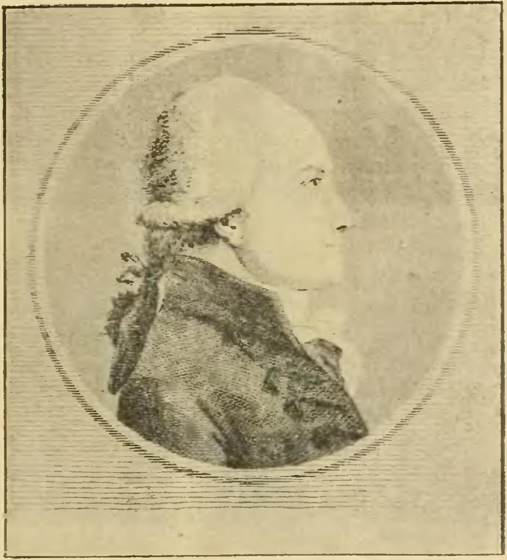 Portrait de J. D. Lanjuinais dans l'Histoire socialiste de la France contemporaine (tome I).